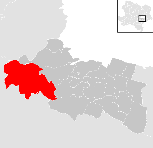 Bezirk Mödling